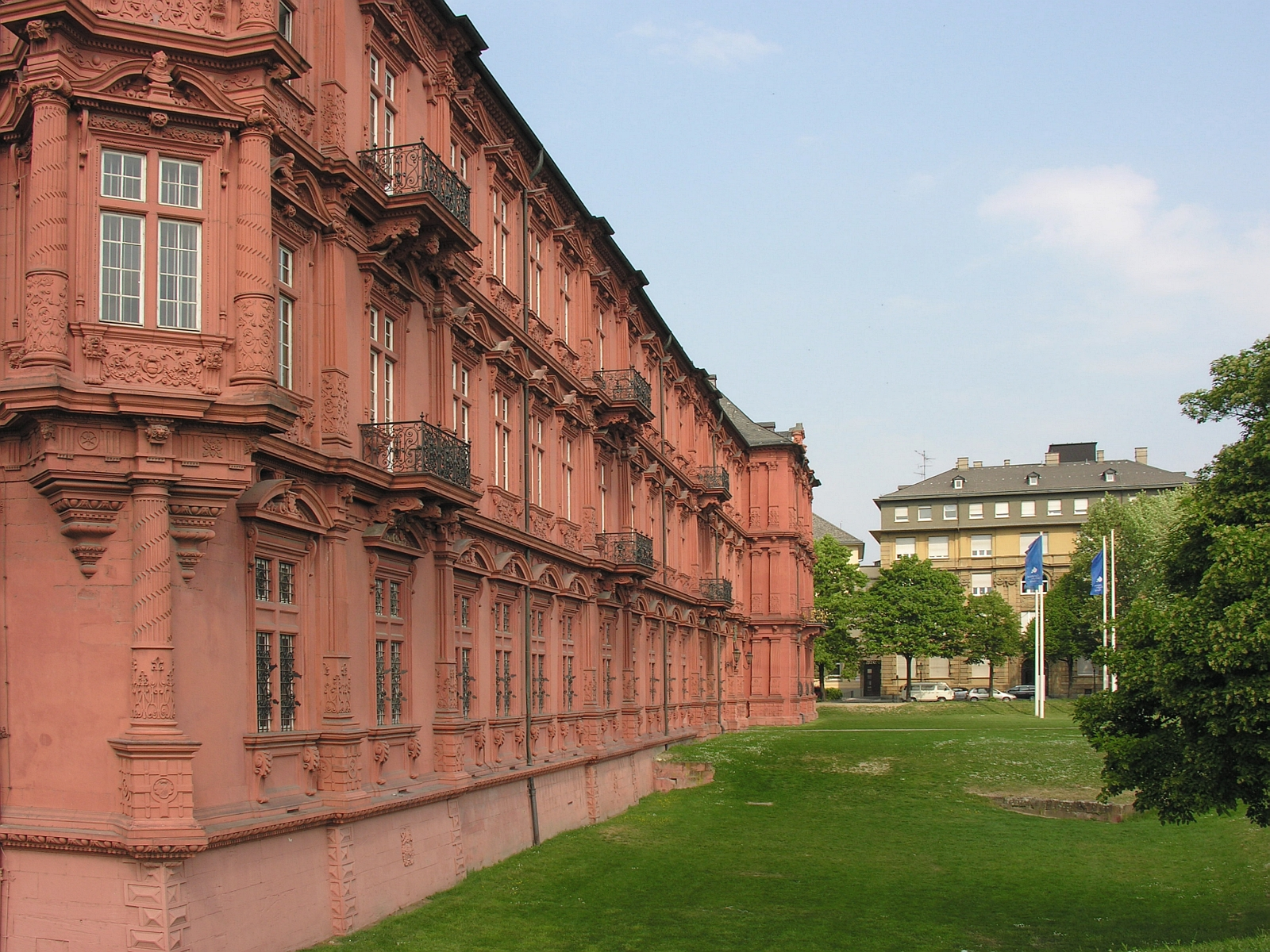 Mainz die nach Osten dem Rhein zugewandte Fassade vom Kurfürstlichen Schloss Foto 2007 Wolfgang Pehlemann Wiesbaden DSCN1345